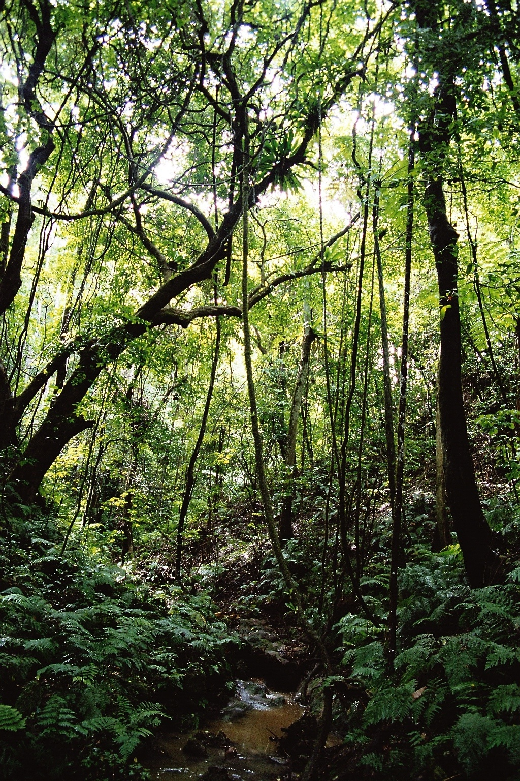 Regenwald auf Eua